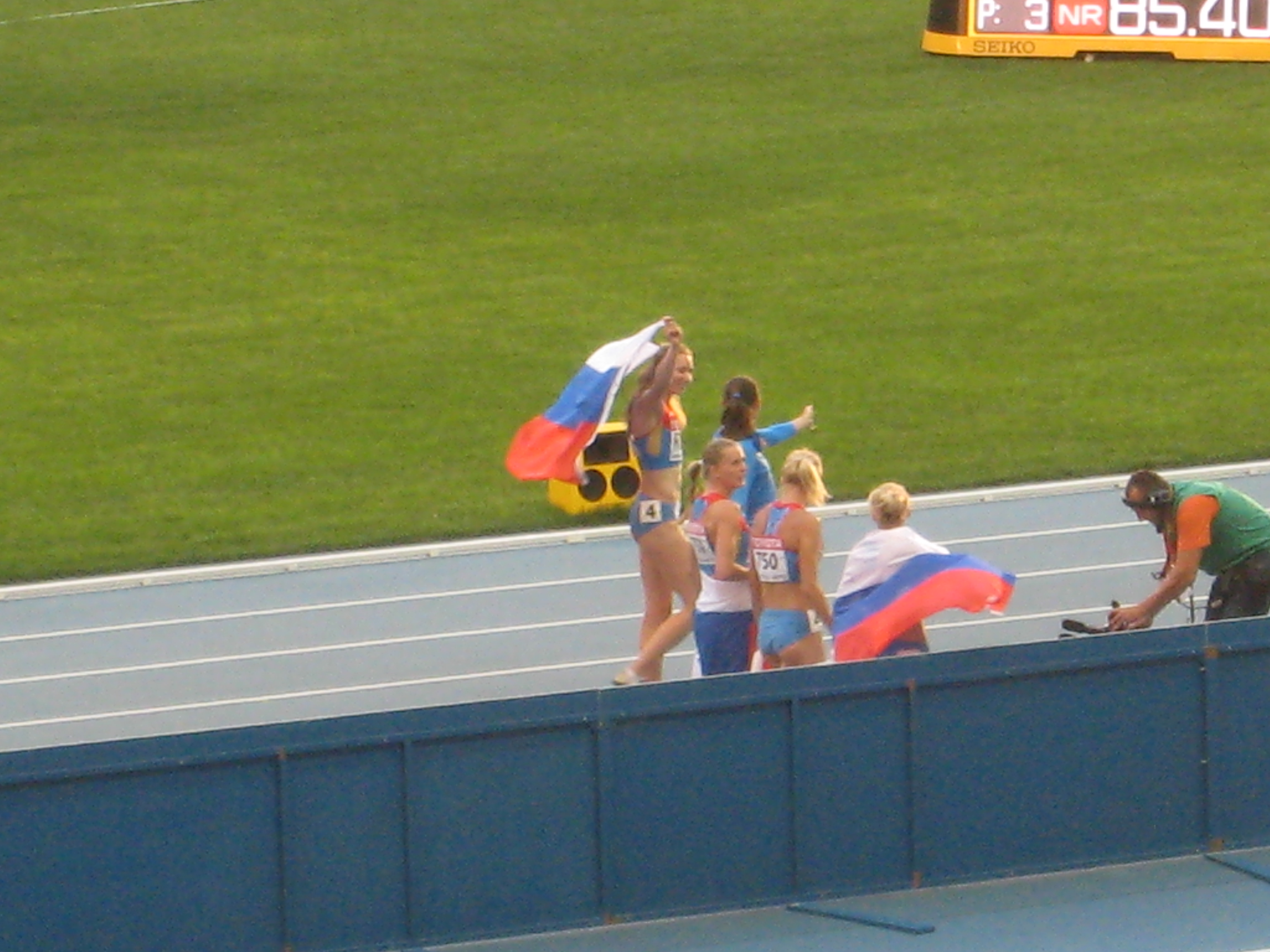 Чемпионат мира по лёгкой атлетике 2013. Эстафетная четвёрка (4 по 400) и Анна Чичерова проходят круг почёта